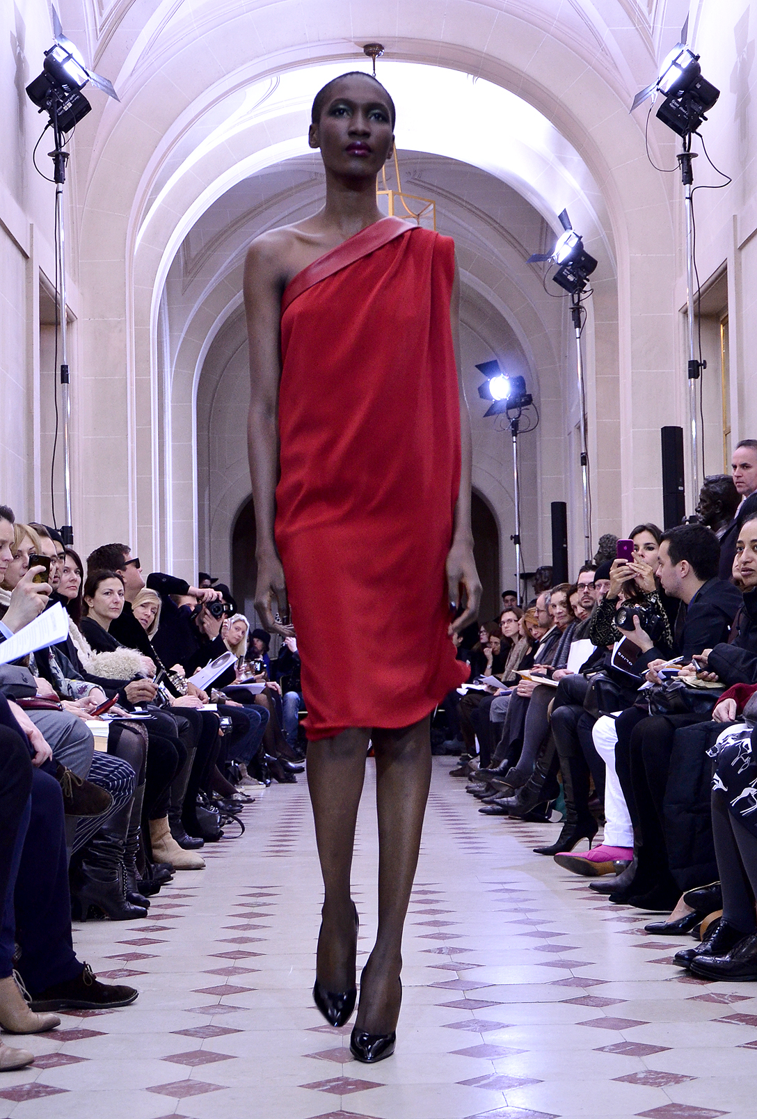 Gustavo Lins